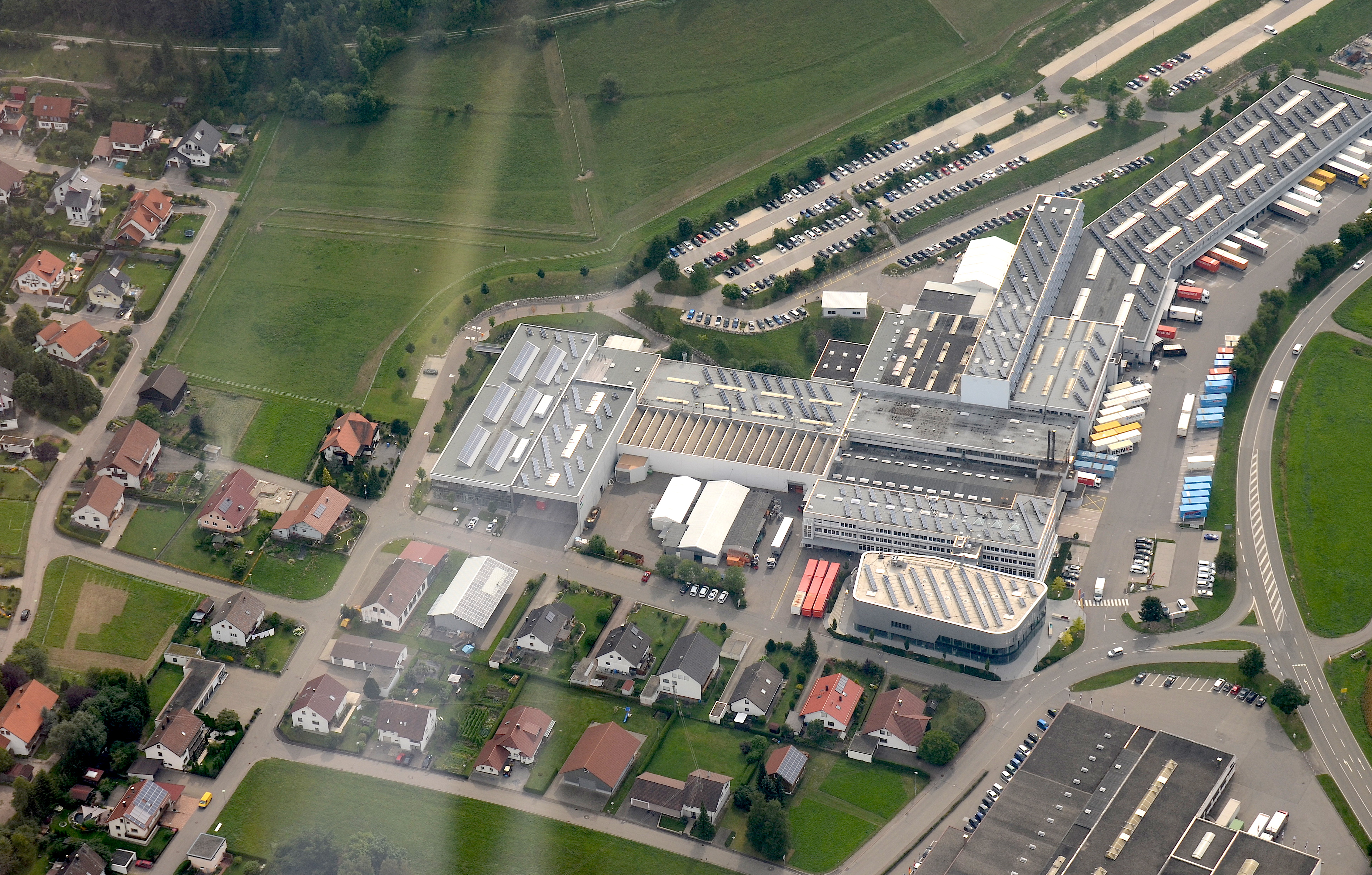 Firma Interstuhl aus der Vogelperspektive (2013)